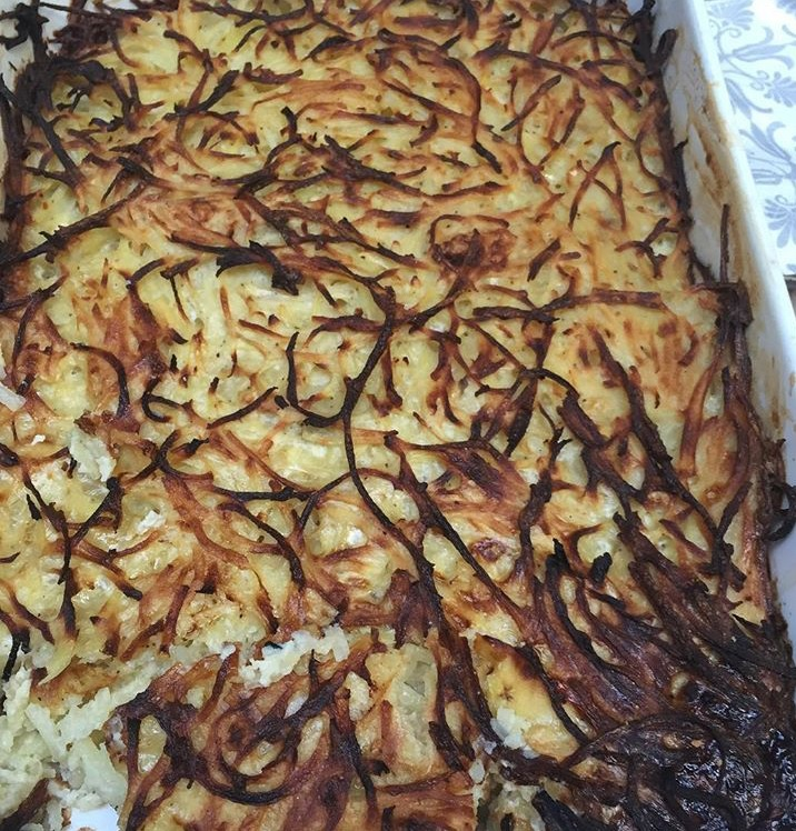 טוץ׳ מסורתי